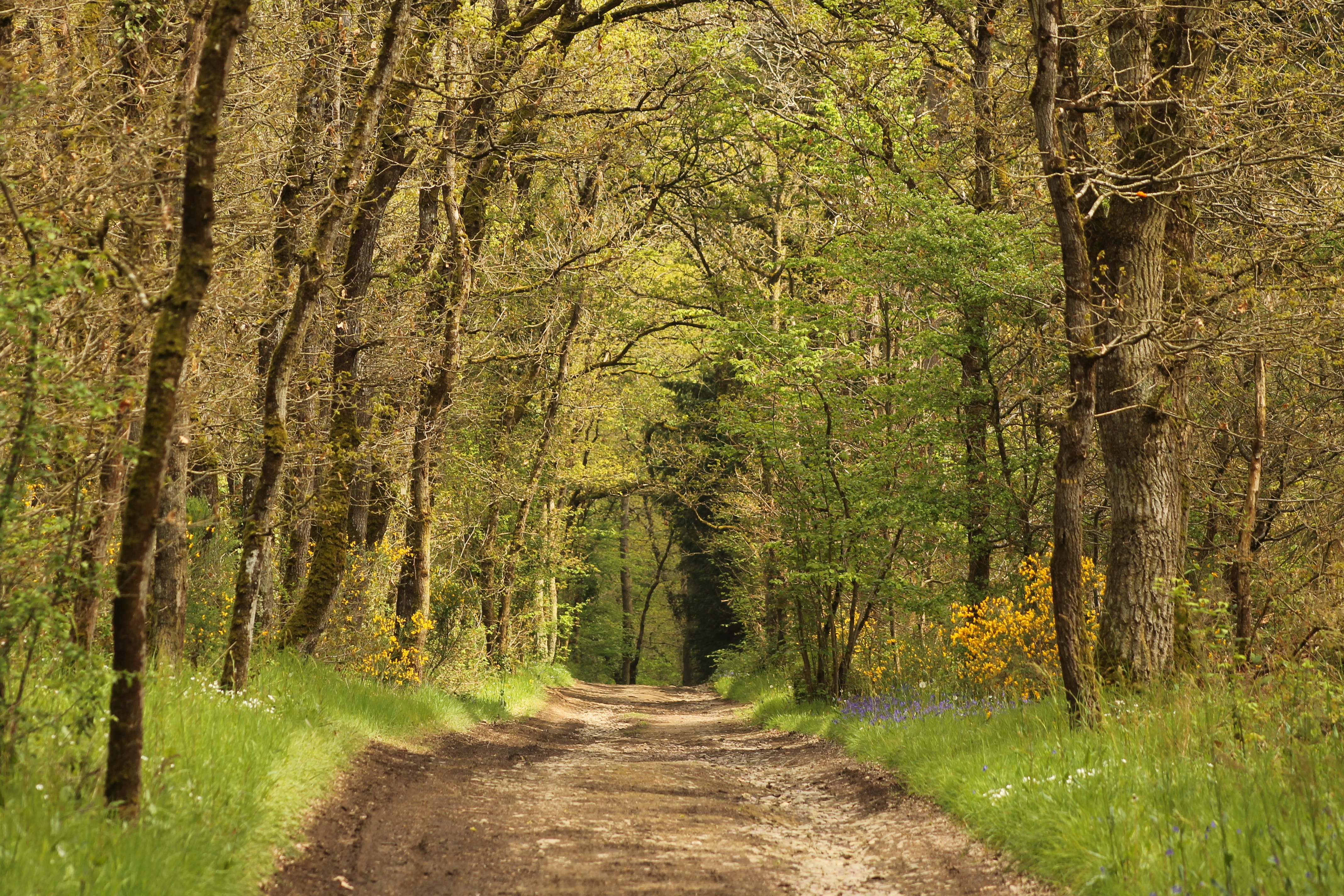 Chemin de Côte Fierville au printemps à Amayé-sur-Orne (Calvados)